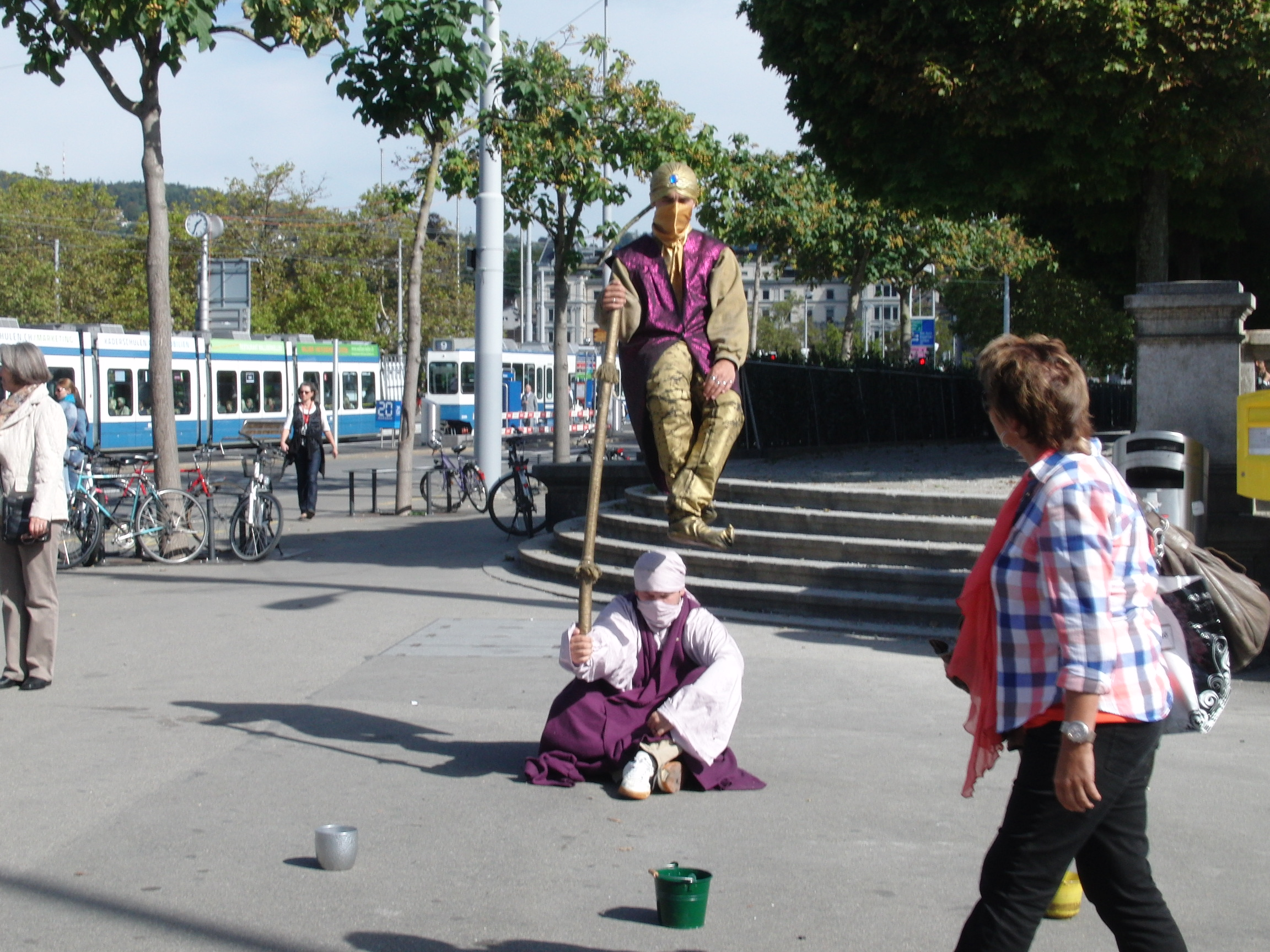 Zwei Strassenzauberkünstler mit einem Schwebetrick